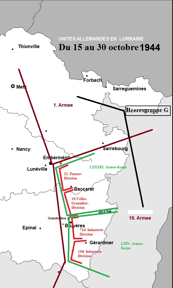 Troupes allemandes engagées dans la bataille de Bruyères, localisation